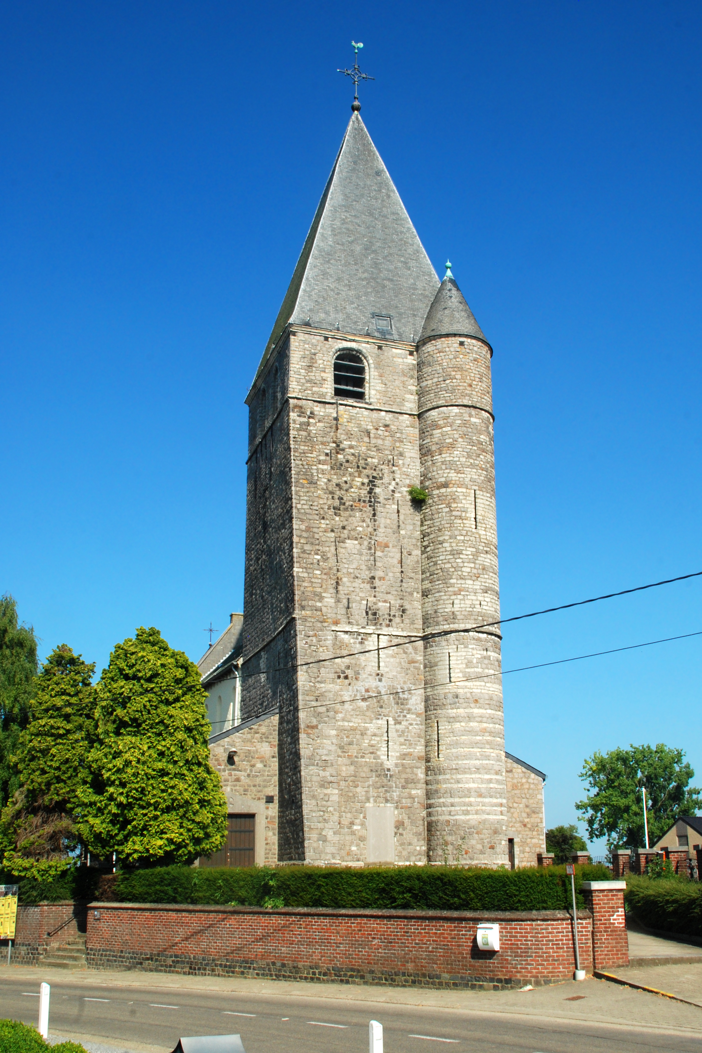 België - Vlaams Brabant - Tienen - Goetsenhoven - Sint-Laurentiuskerk